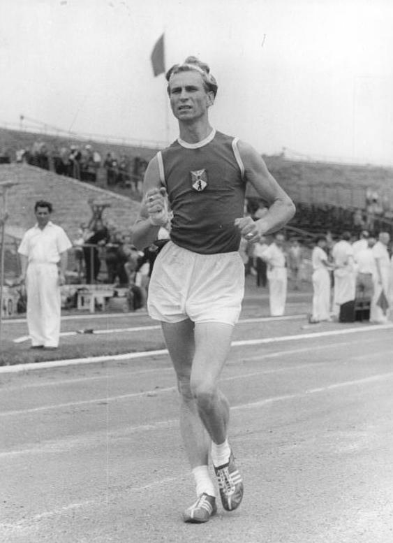 Kurt Sakowski Zentralbild Zimmermann 14.7.1957 3. Tag Deutsche Leichtathletikmeisterschaften 1957 im Walter-Ulbricht-Stadion, Berlin. UBz: Kurt Sakowski vom SC Einheit Berlin gewann das 20 km-Gehen.